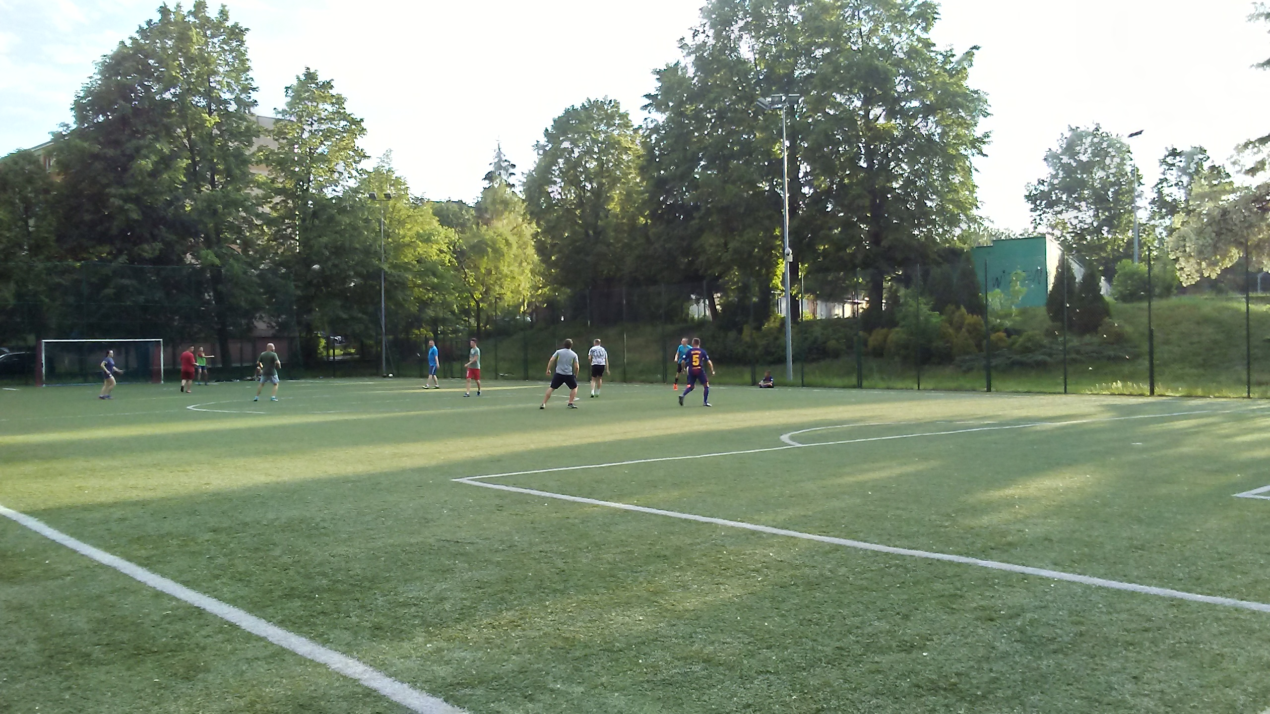 Fotografia przedstawia boisko do gry w piłkę nożna przy II Liceum Ogólnokształcącym w Tomaszowie Mazowieckim w województwie łódzkim.